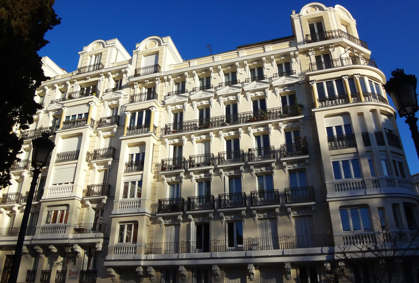 Edificio en la plaza de la Encarnación, Madrid, España. Симпатичный дом